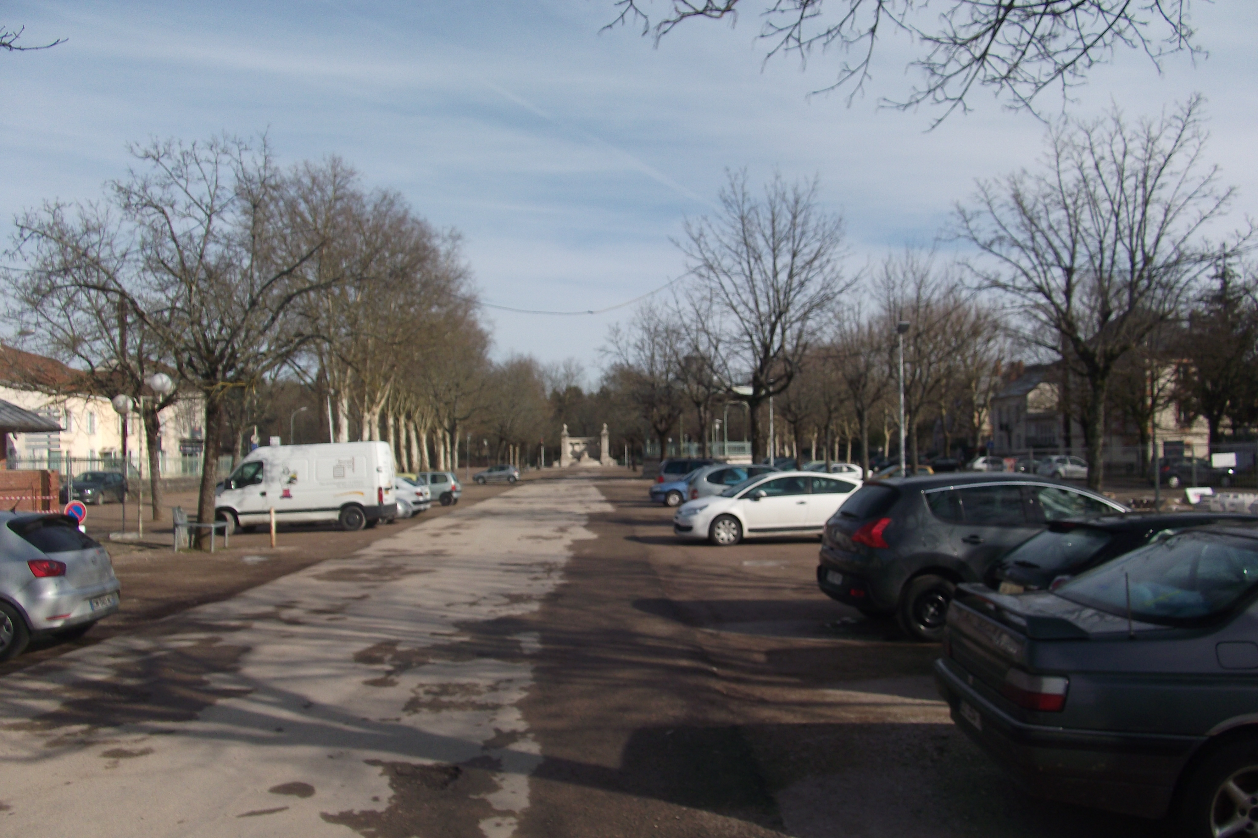 La Place des Allées de Vesoul